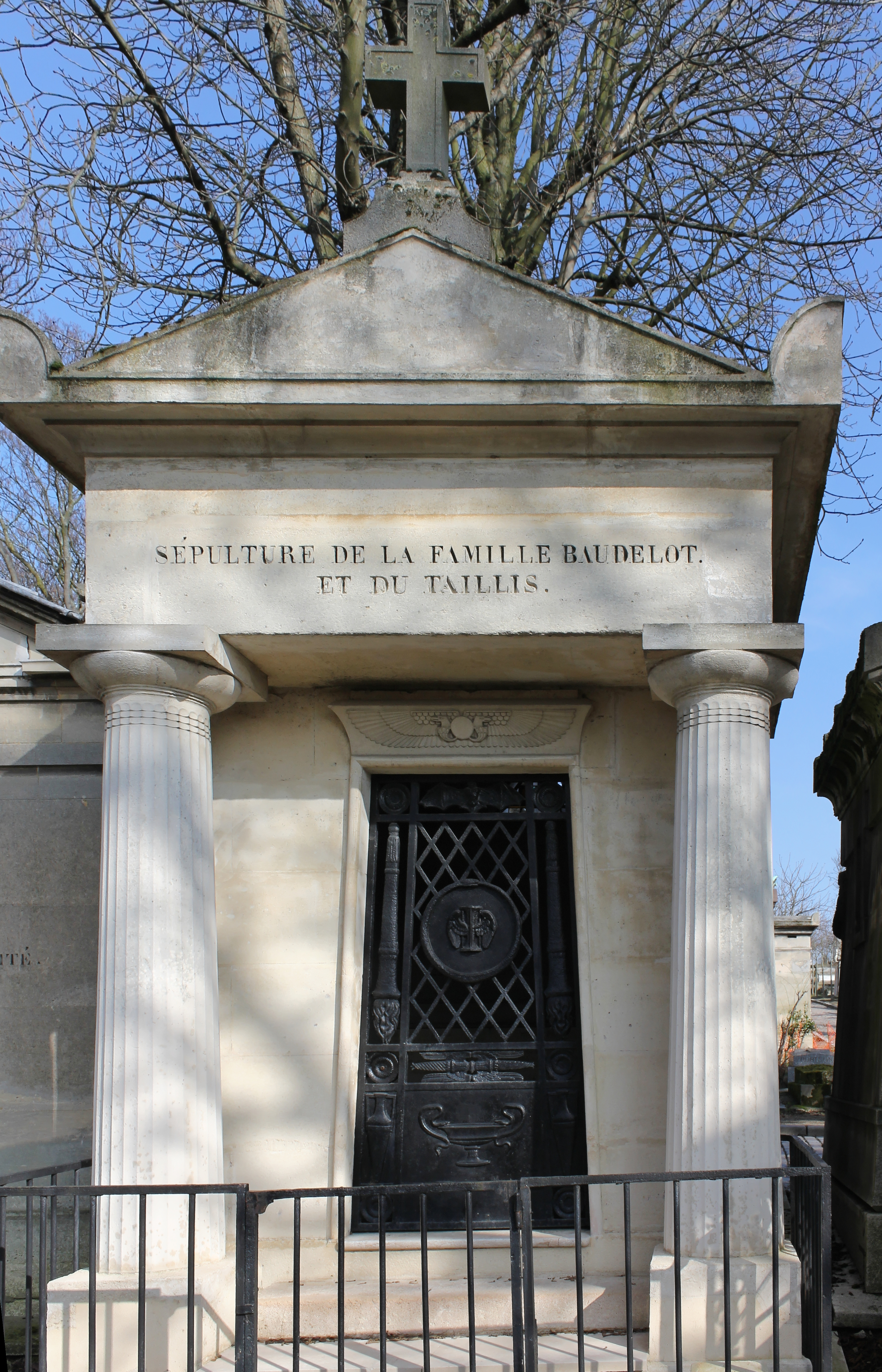 Sépulture d'Adrien Jean-Baptiste du Bosc (1760-1851), général.